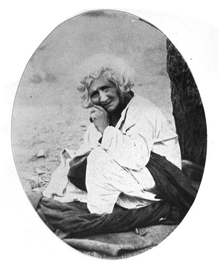 Hazrat Babajan, Char Bavadi, Pune, India